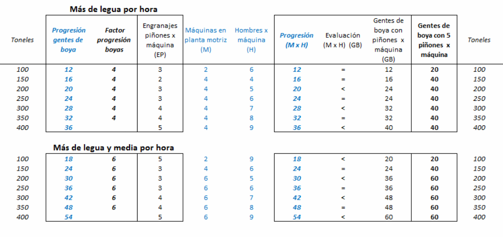 Caculos de fuerza y planta motriz de Garay (3)